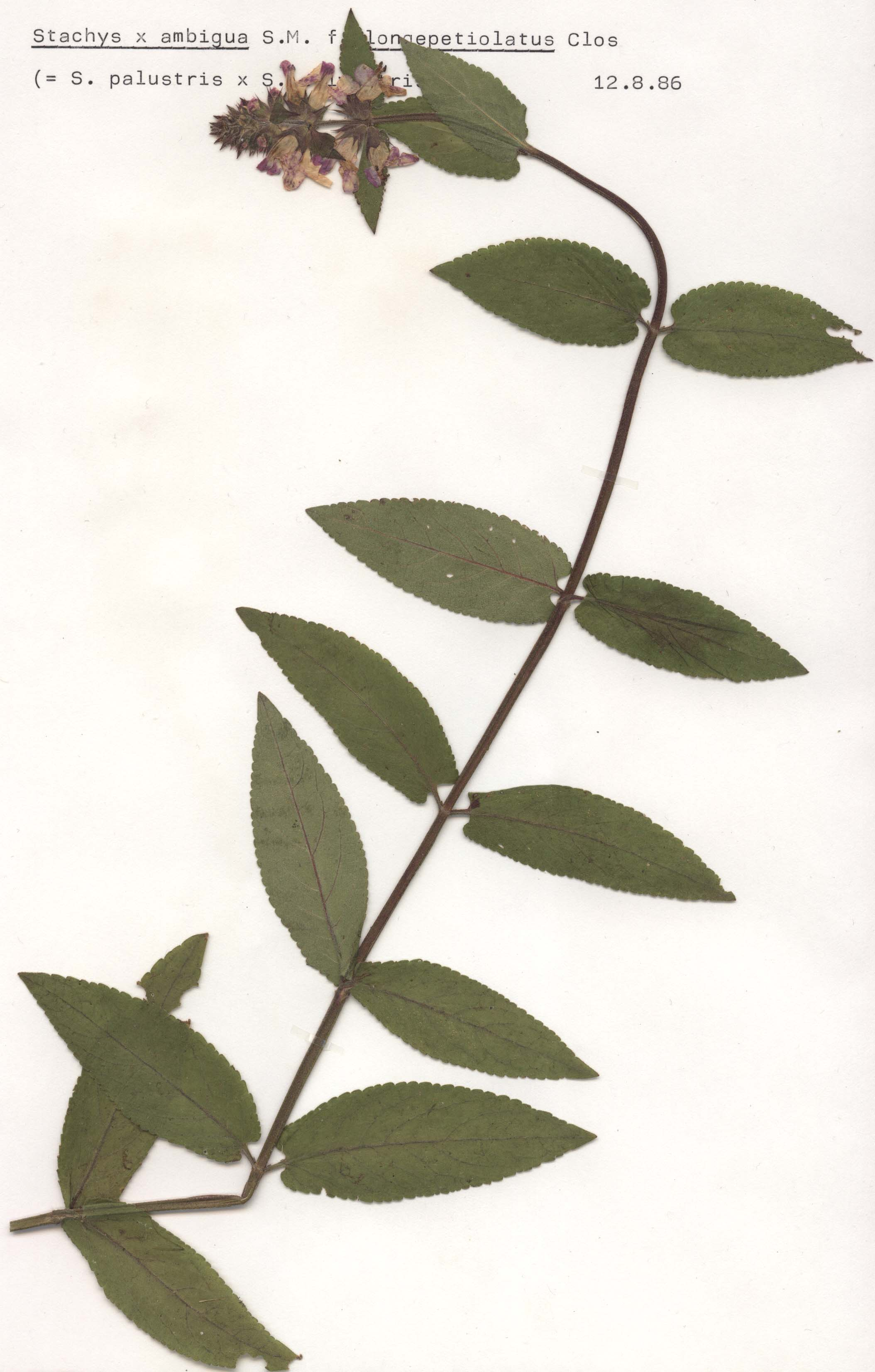 Stachys x ambigua, eigener Herbarbeleg von 1986, Unterfranken